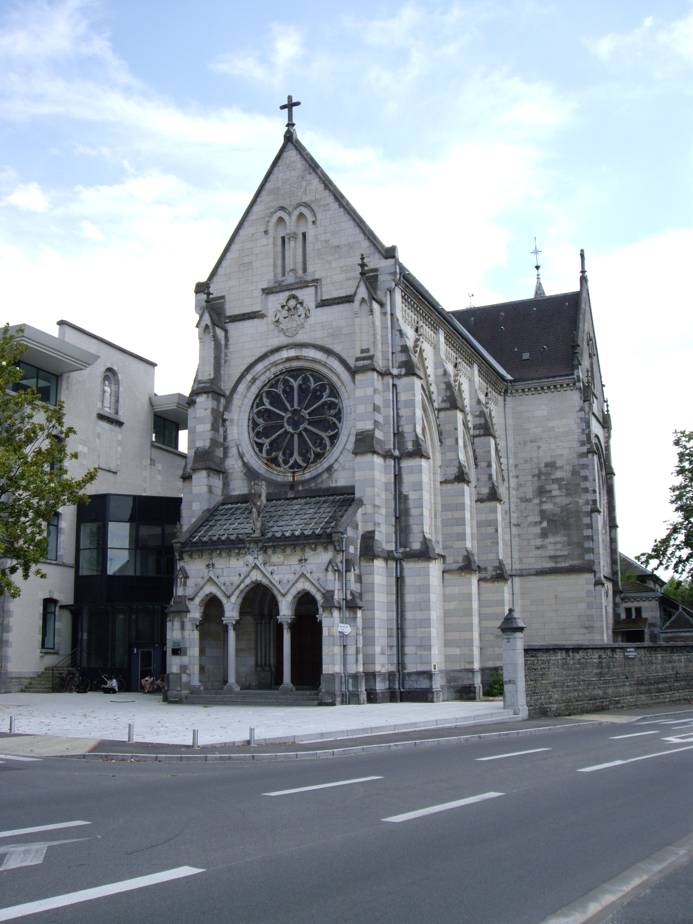 Chapelle du couvent des Réparatrices de Pau (64) devenu école de musique